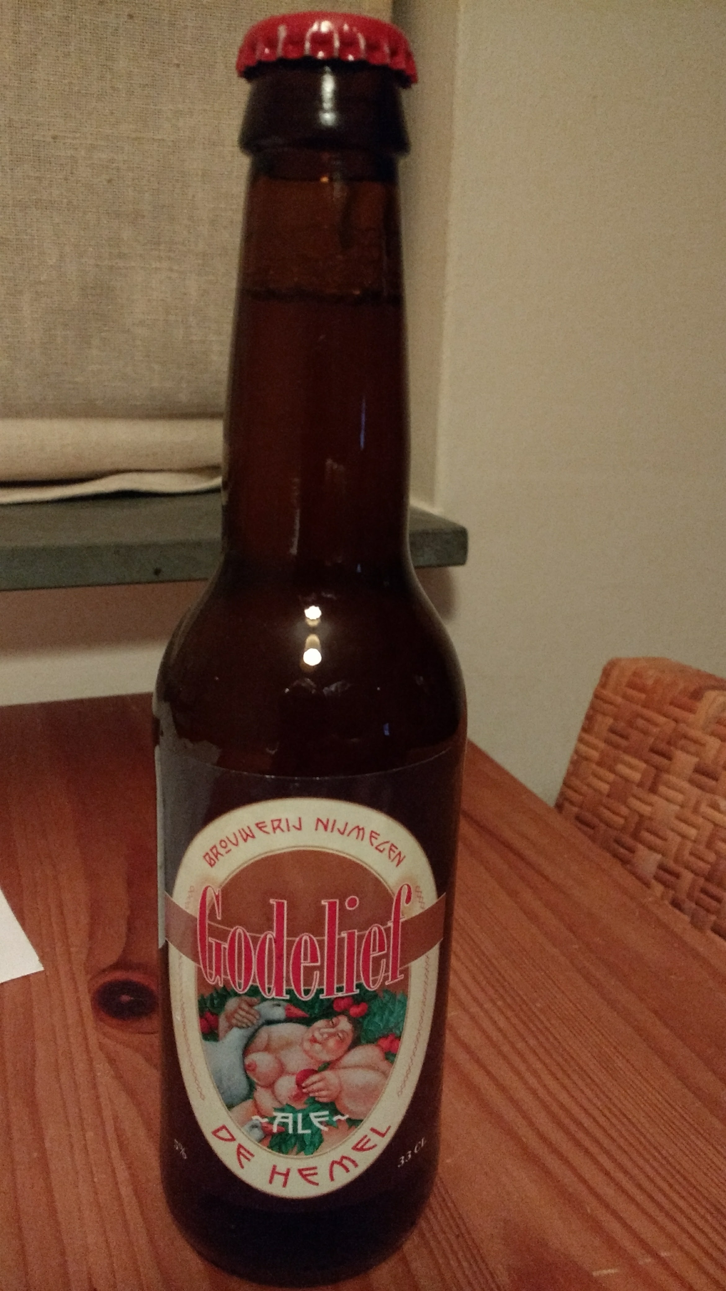 Stadsbrouwerij De Hemel Nijmegen, bier Godelief